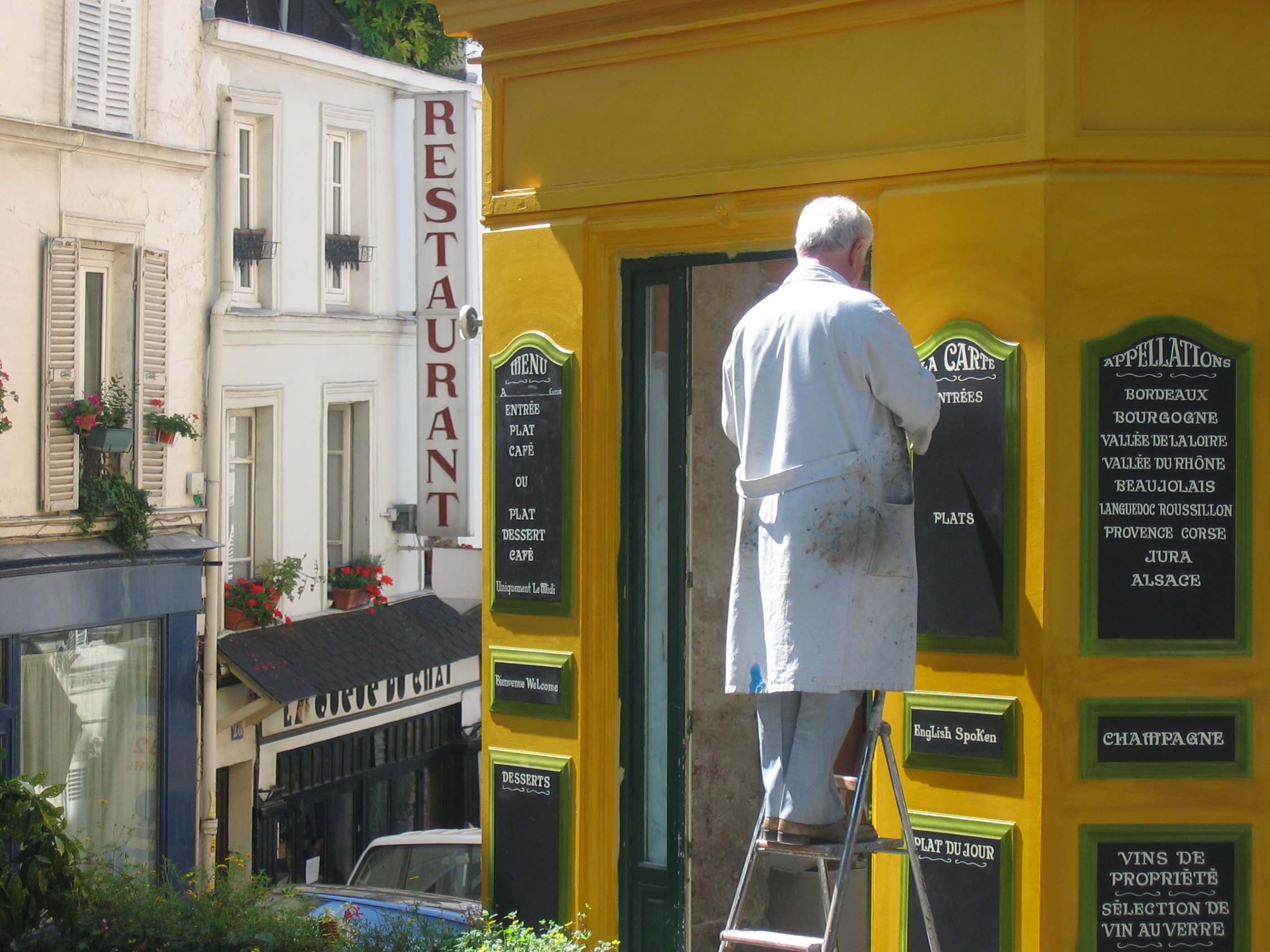 Ein Besitzer gestaltet die Fassade seines Restaurants auf dem Montmartre Ecke Rue Lepic/Rue Tholozé gegenüber der Moulin de la Galette. Typisches Beispiel für das Montmartre abseits der Touristenpfade. Quelle: "Selbst fotografiert", Paris 2005 Fotograf: Heiko Schwientek, Aazarus